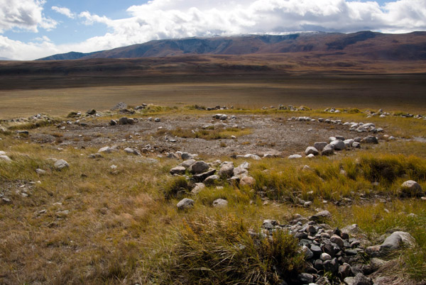 Могила принцессы Укока, могильник Ак-Алаха